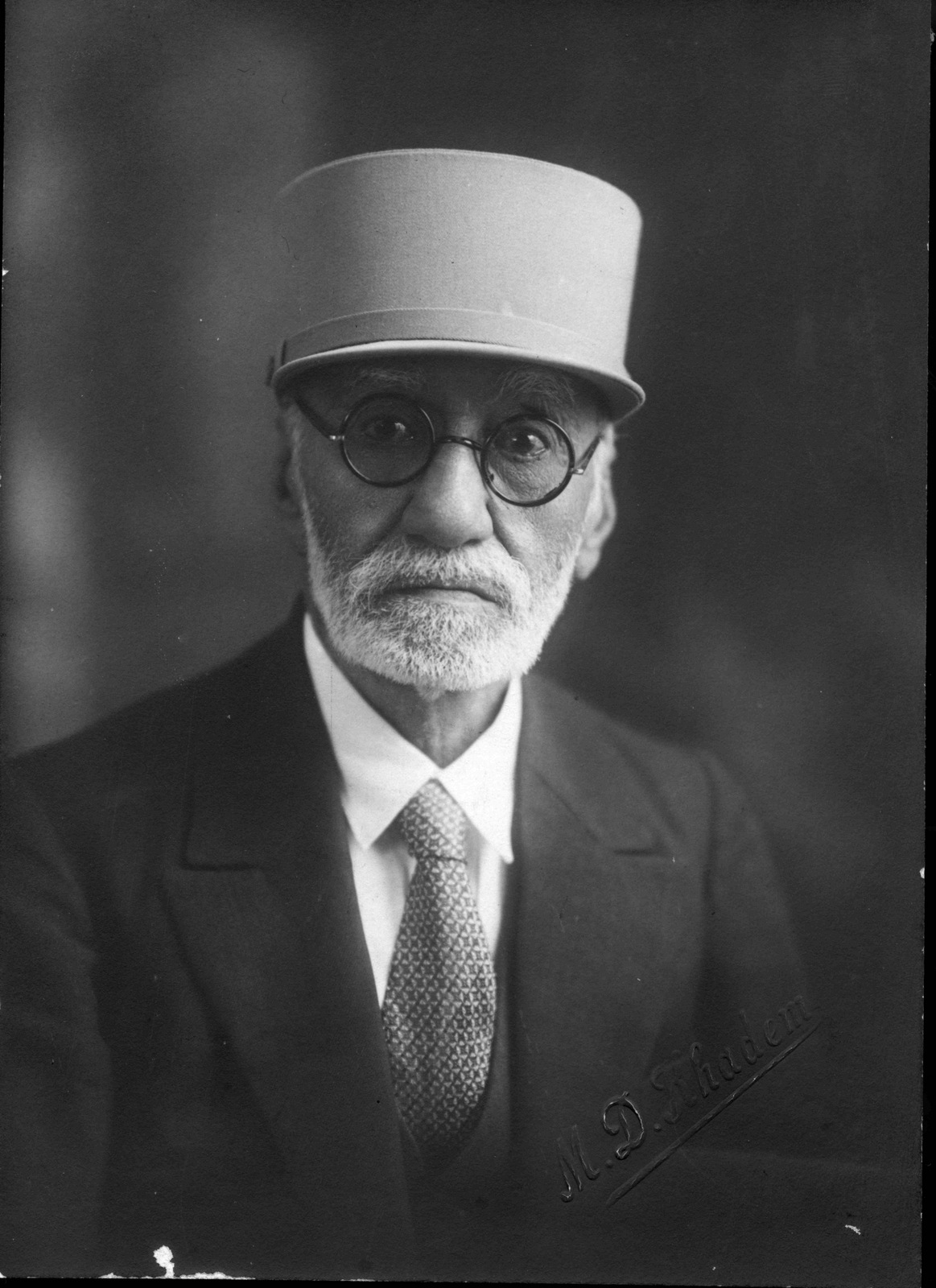 Mokrem ol-Saltaneh, le père de Momtaz os-Saltaneh homme politique et ancien ambassadeur de Perse à Paris.